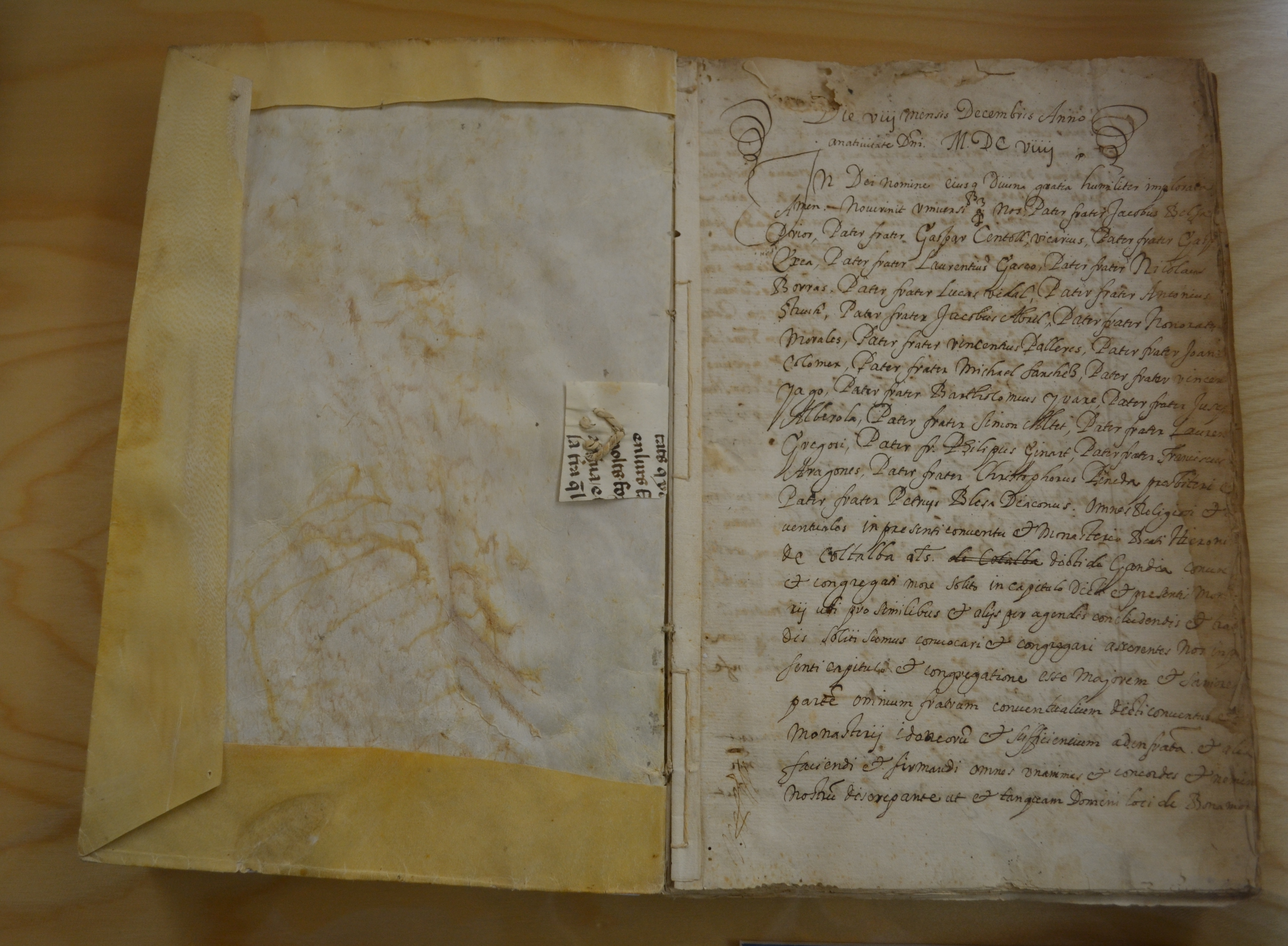 Fra Jeroni Belsa, prior, i amb ell la comunitat del Monestir de Sant Jeroni de Cotalba, concedeixen carta pobla al lloc de Llocnou de Bonamira ( o de Sant Jeroni) a Pere Climent i a 14 pobladores més (8 de desembre de 1609). ARV: Clero, llibre 567, fol. 1 (còpia de de 1702)